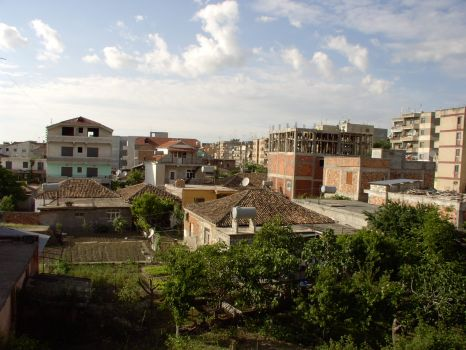 Kavajë (Albania)